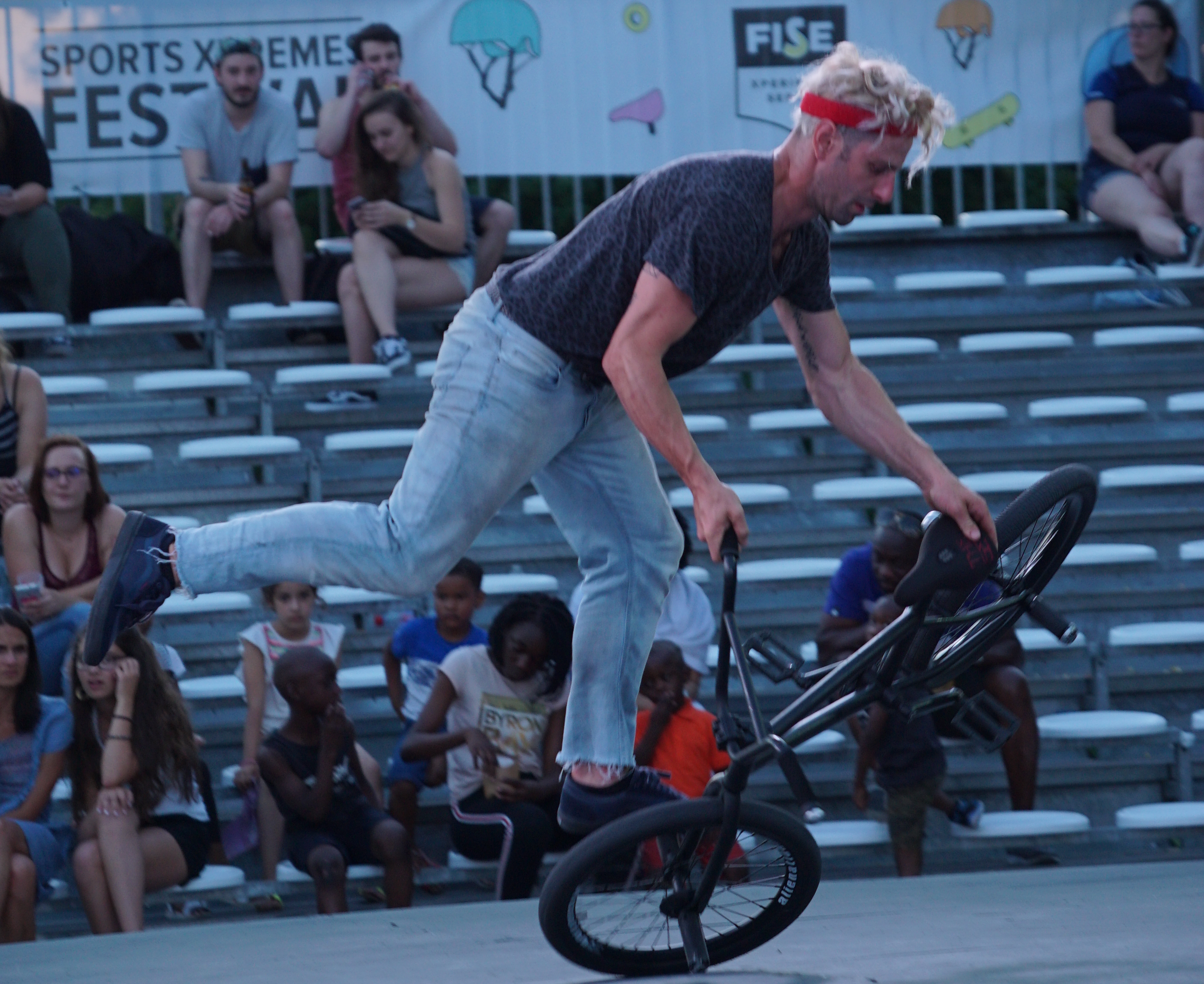 au parc Léo Lagrange.